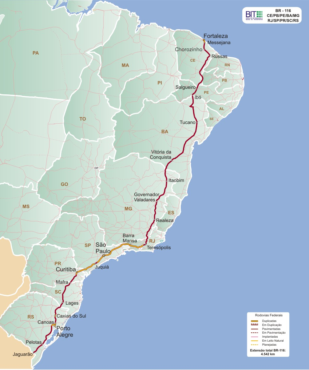 Mapa descritivo da BR-116 em relação as outras rodovias brasileiras.